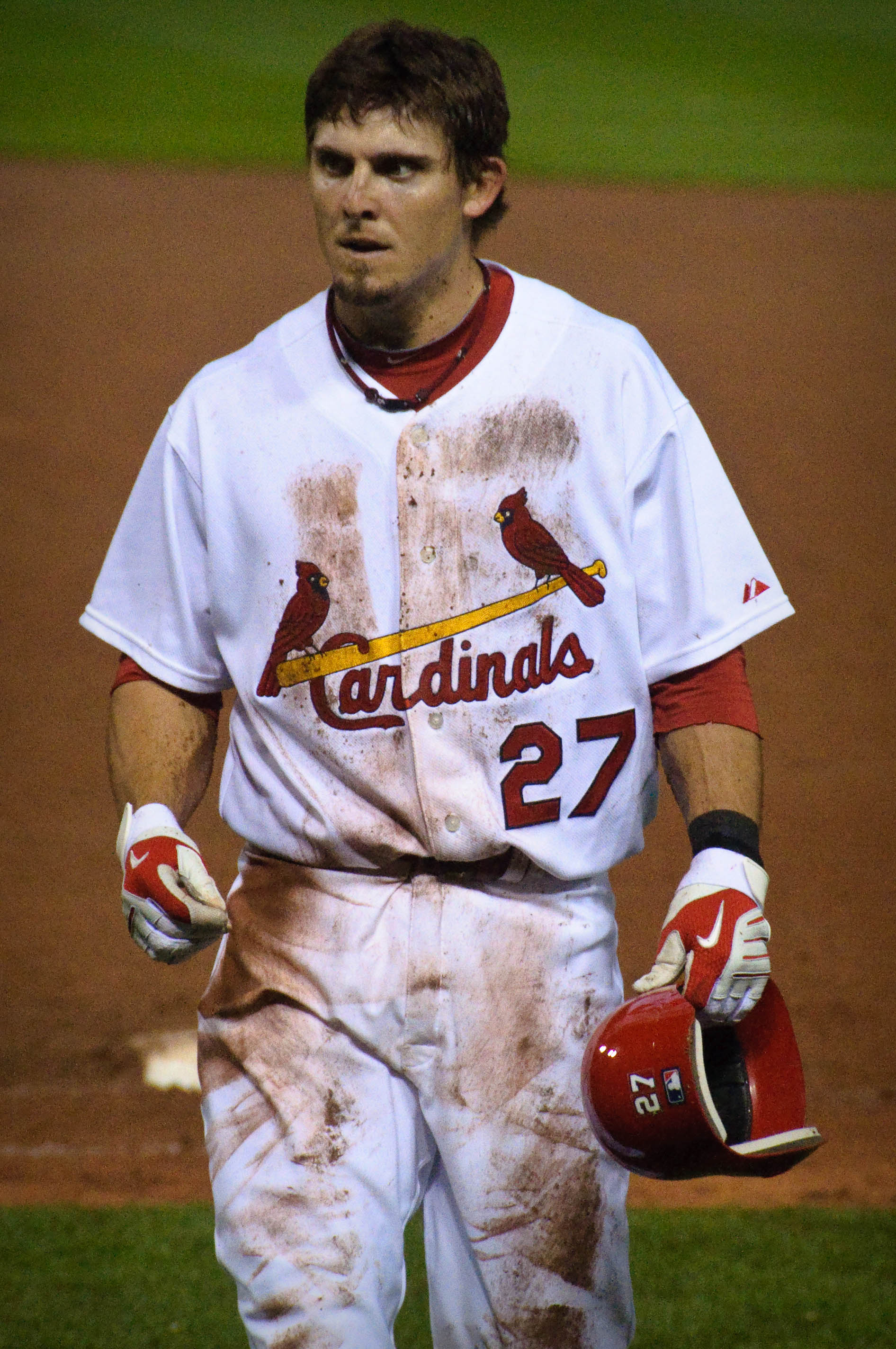 Tyler Greene